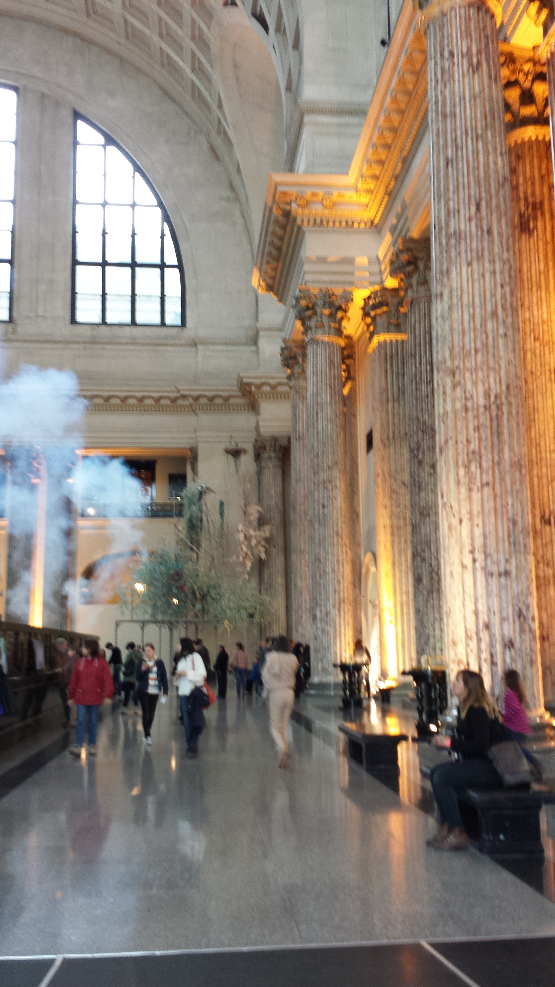 Banco República en Ciudad Vieja